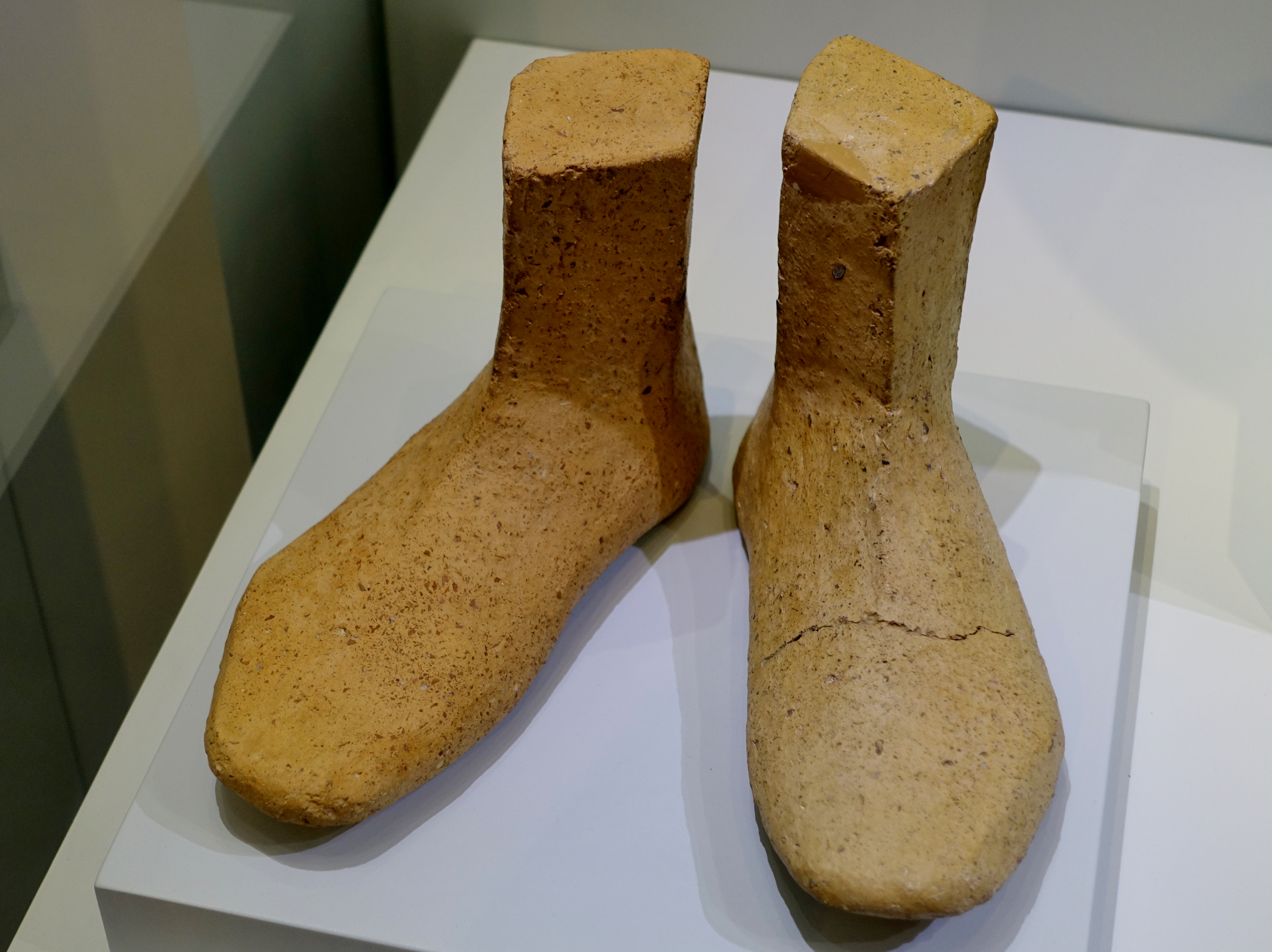 Schuhe aus Ton einer wahrscheinlich hölzernen Gottheit aus dem neupalastzeitlichen Heiligtum von Anemospilia (1700–1650 v. Chr.), ausgestellt im Archäologischen Museum Iraklio, Kreta, Griechenland